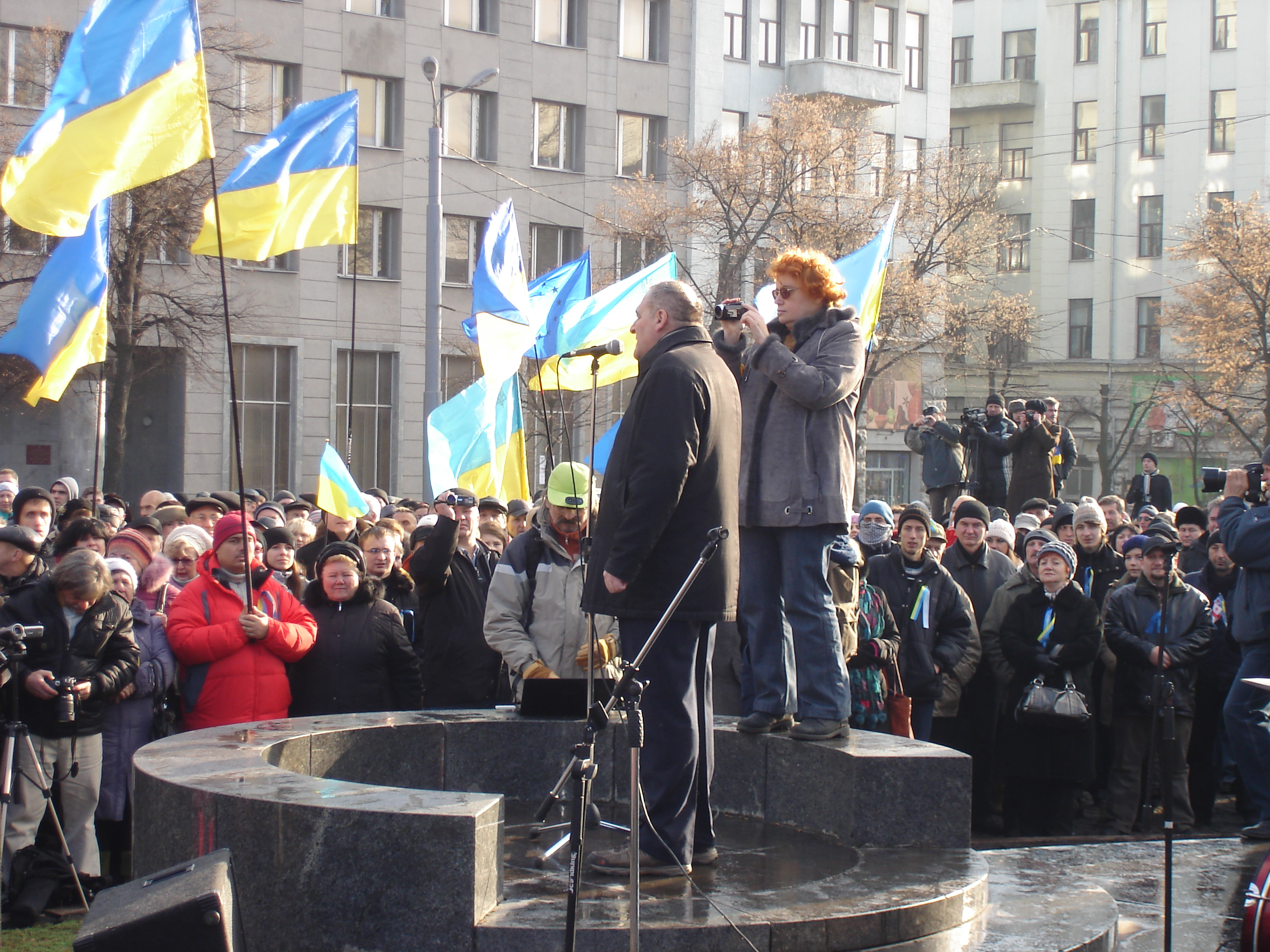 Харківський Євромайдан акцію проти свавілля влади біля пам'ятника Тарасу Шевченку після жорстокого побиття молоді у Києві. 01.12.2013.Виступає директор «Харківської правозахисної групи» Євген Захаров.З камерою праворуч від нього — Наталія Зубар; за ноутбуком — Віктор Гарбар.